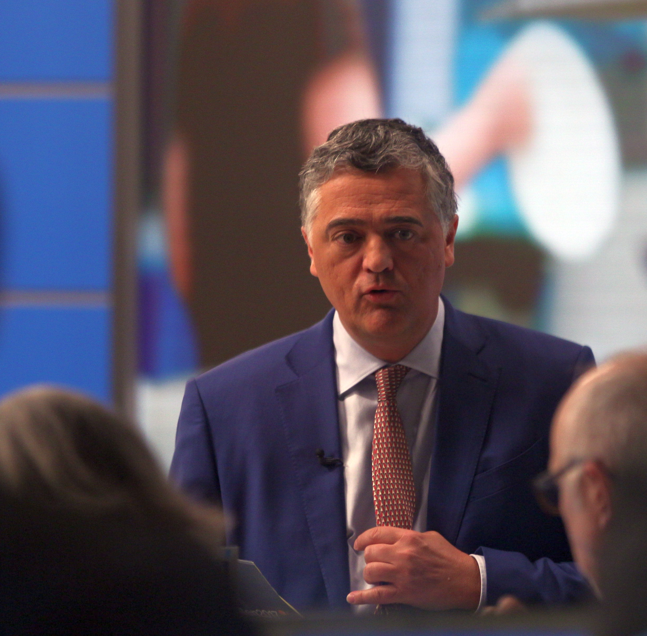 Matthias Fornoff (ZDF) beim Wahlabend zur Landtagswahl im Saarland